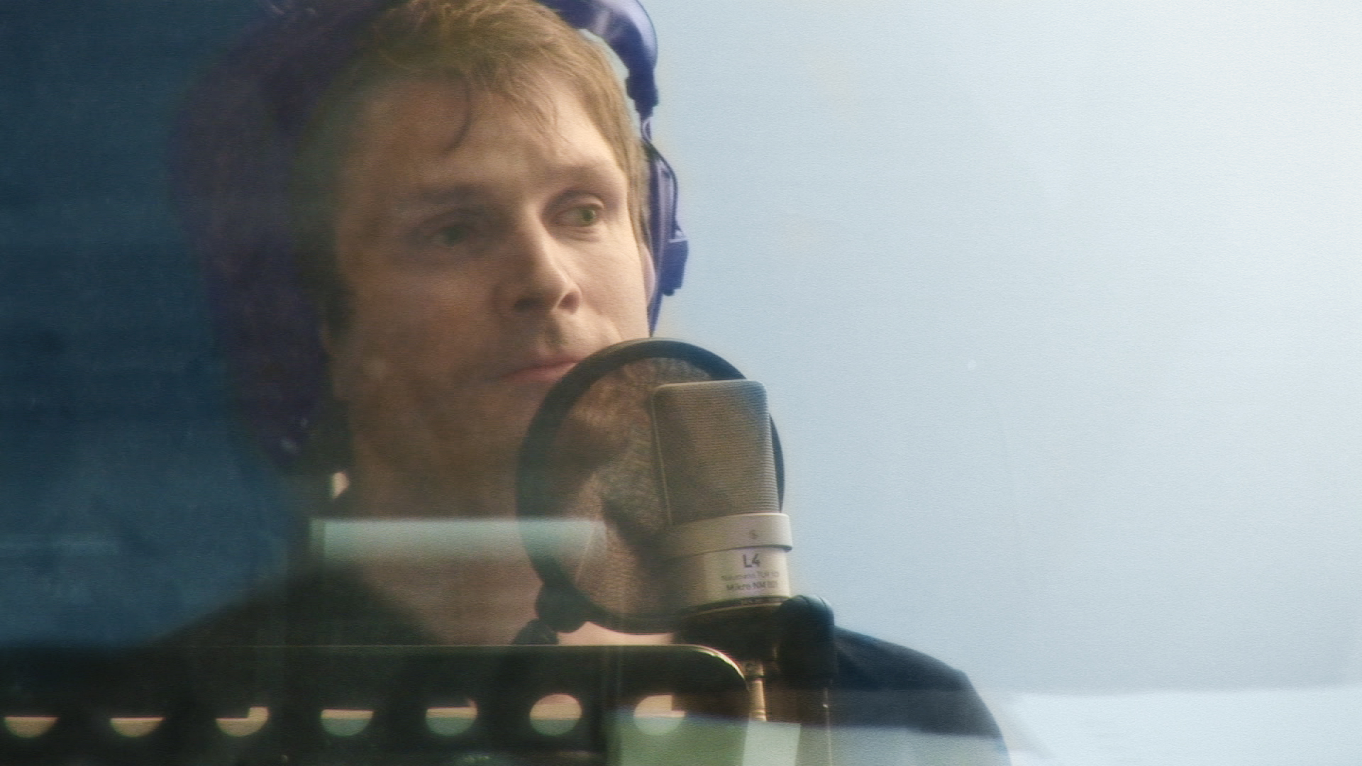 Karlo Hackenberger während der Synchronisation des Films "Der Gründer" 2009 in Berlin